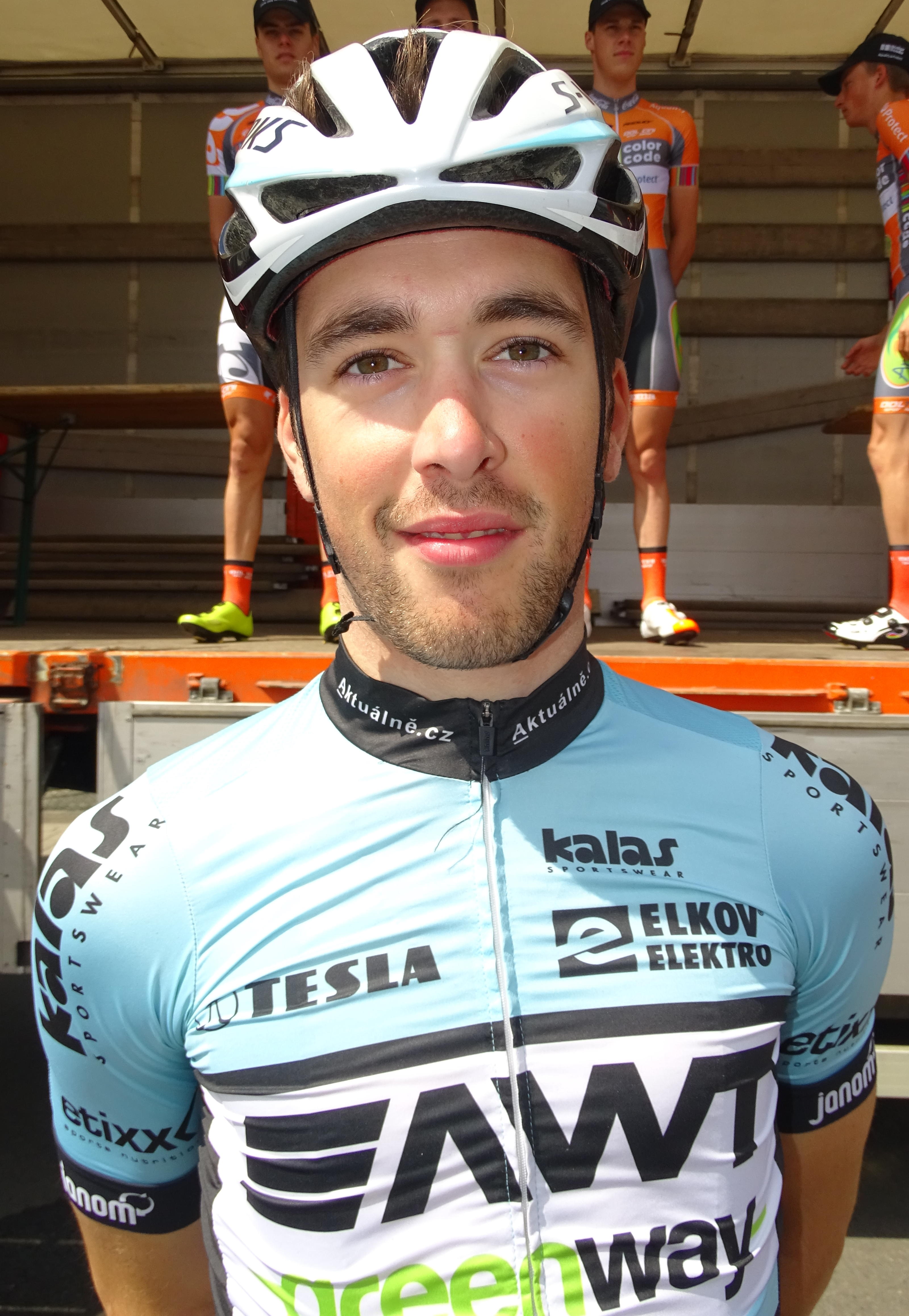 Reportage réalisé le dimanche 7 juin à l'occasion du départ du Mémorial Philippe Van Coningsloo 2015 à Wavre, Belgique.